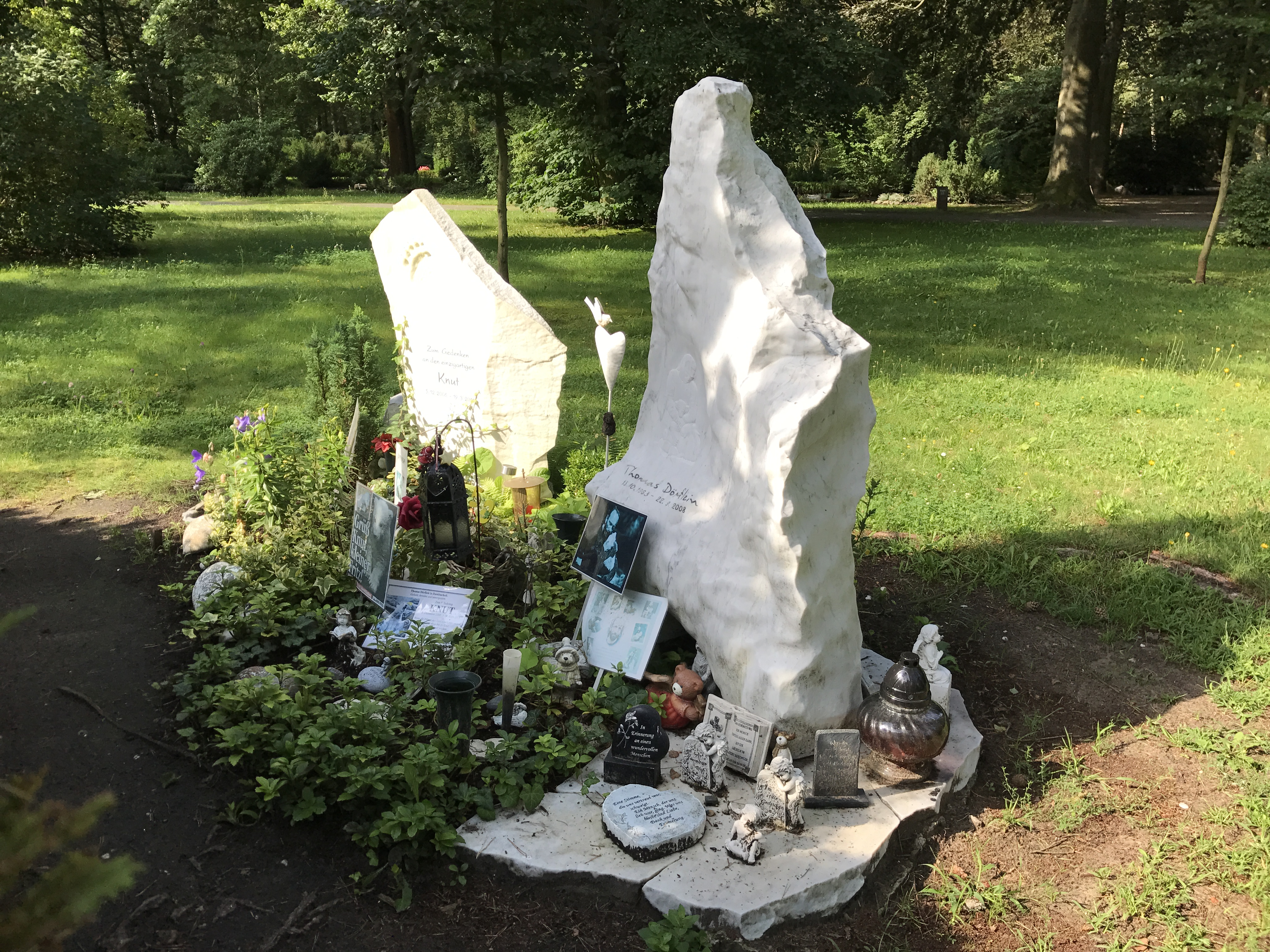 Knut-Denkmal auf dem Spandauer Friedhof In den Kisseln zur Erinnerung an den Eisbären Knut im Zoologischen Garten Berlins, mit Grabmal des Tierpflegers von Eisbär Knut, Thomas Dörflein